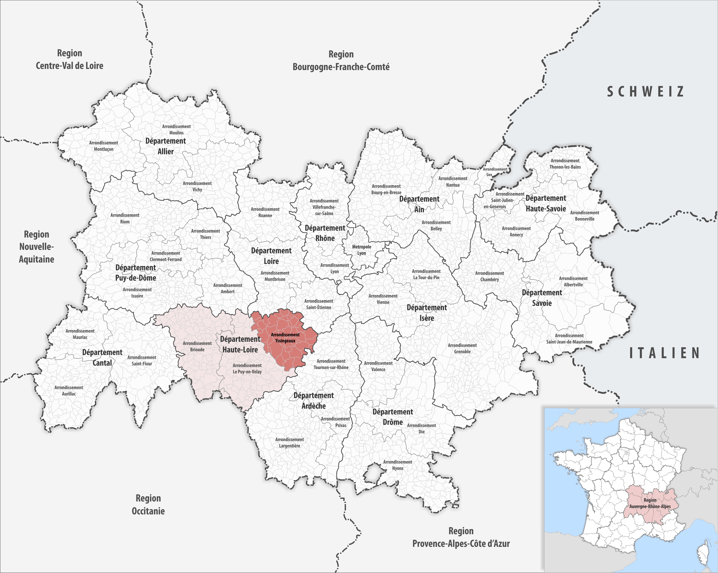 Lage des Arrondissements Yssingeaux